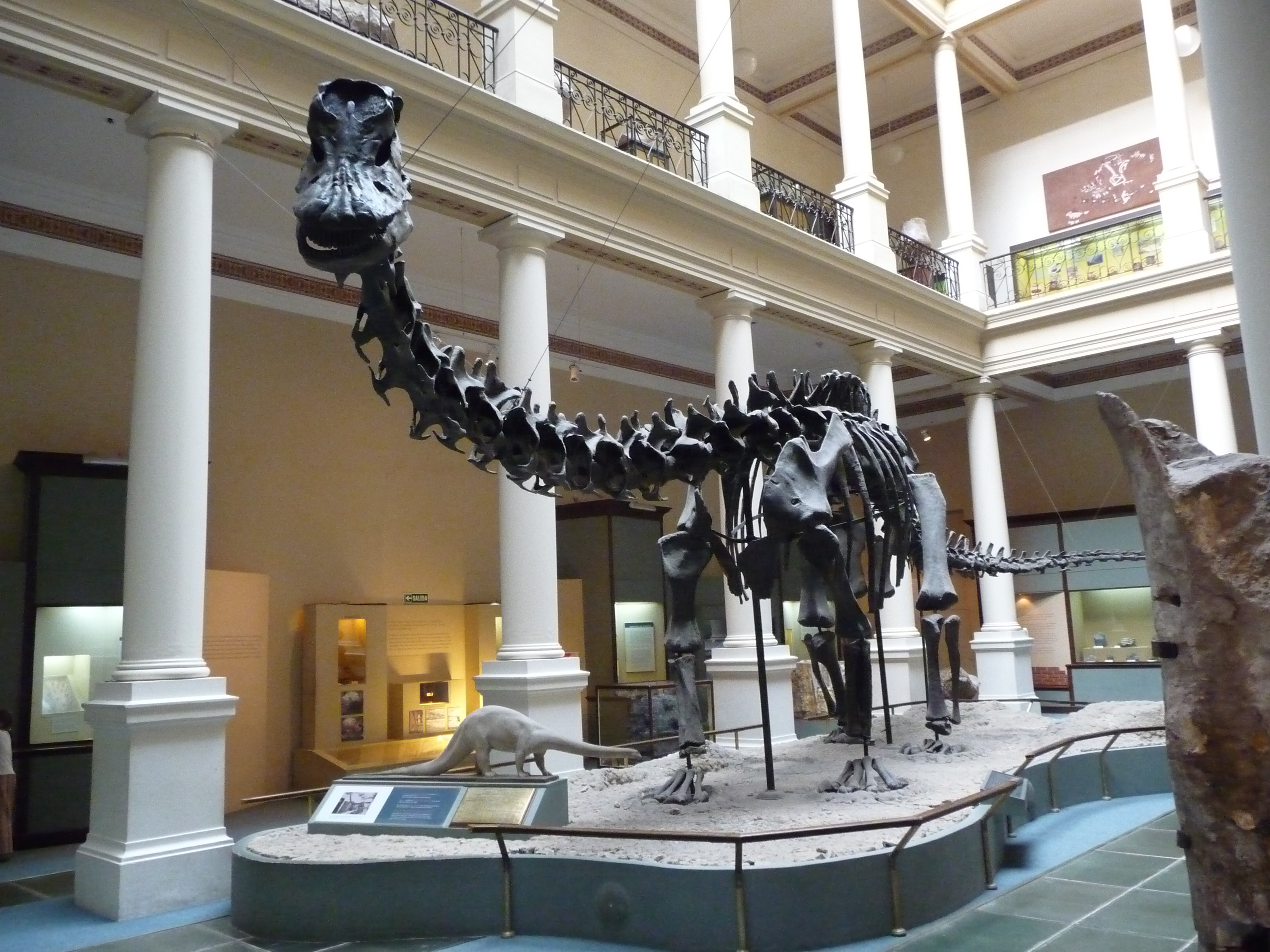 Copy of a Diplodocus fossil displayed in the La Plata Natural History Museum